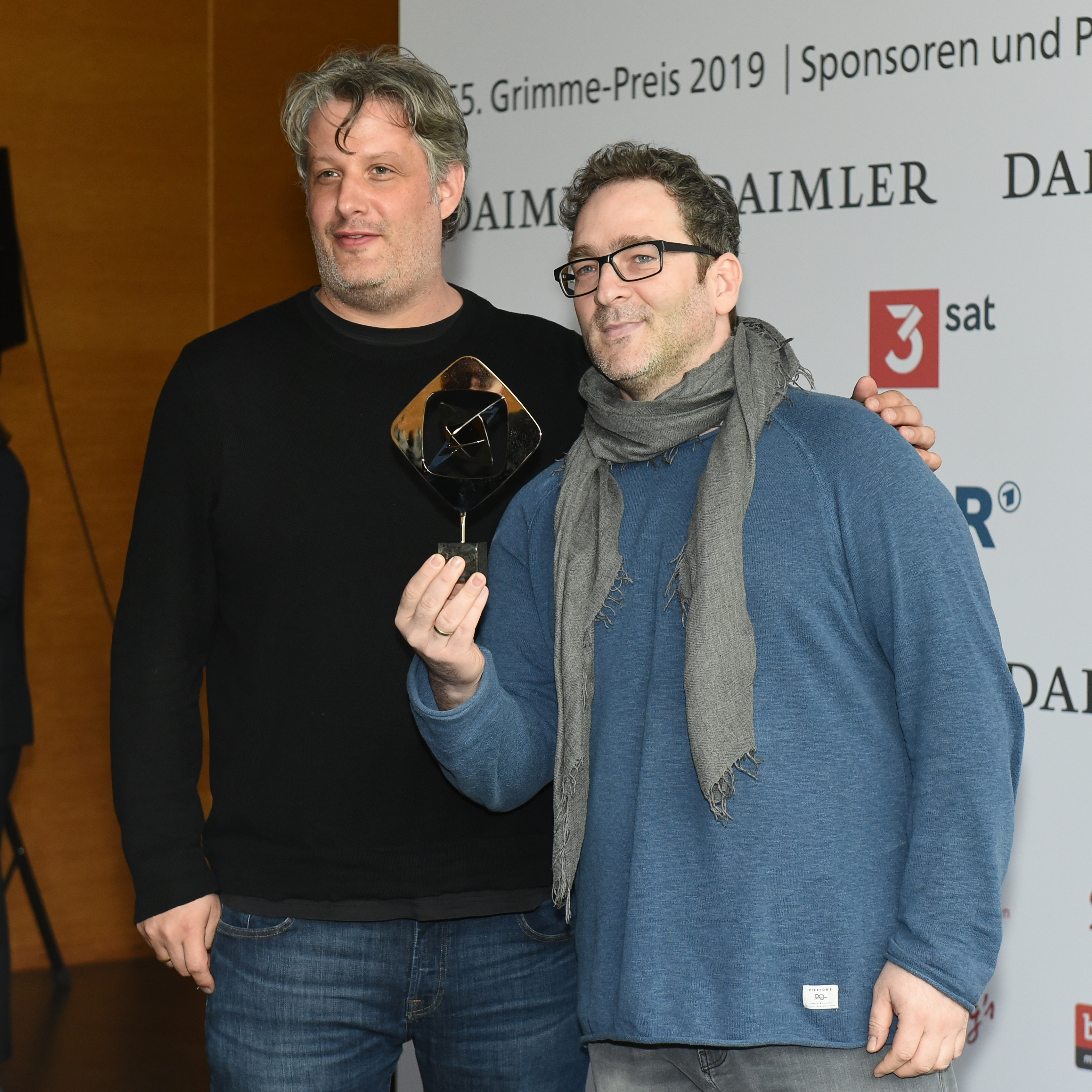 Verleihung des Grimme-Preises 2019.